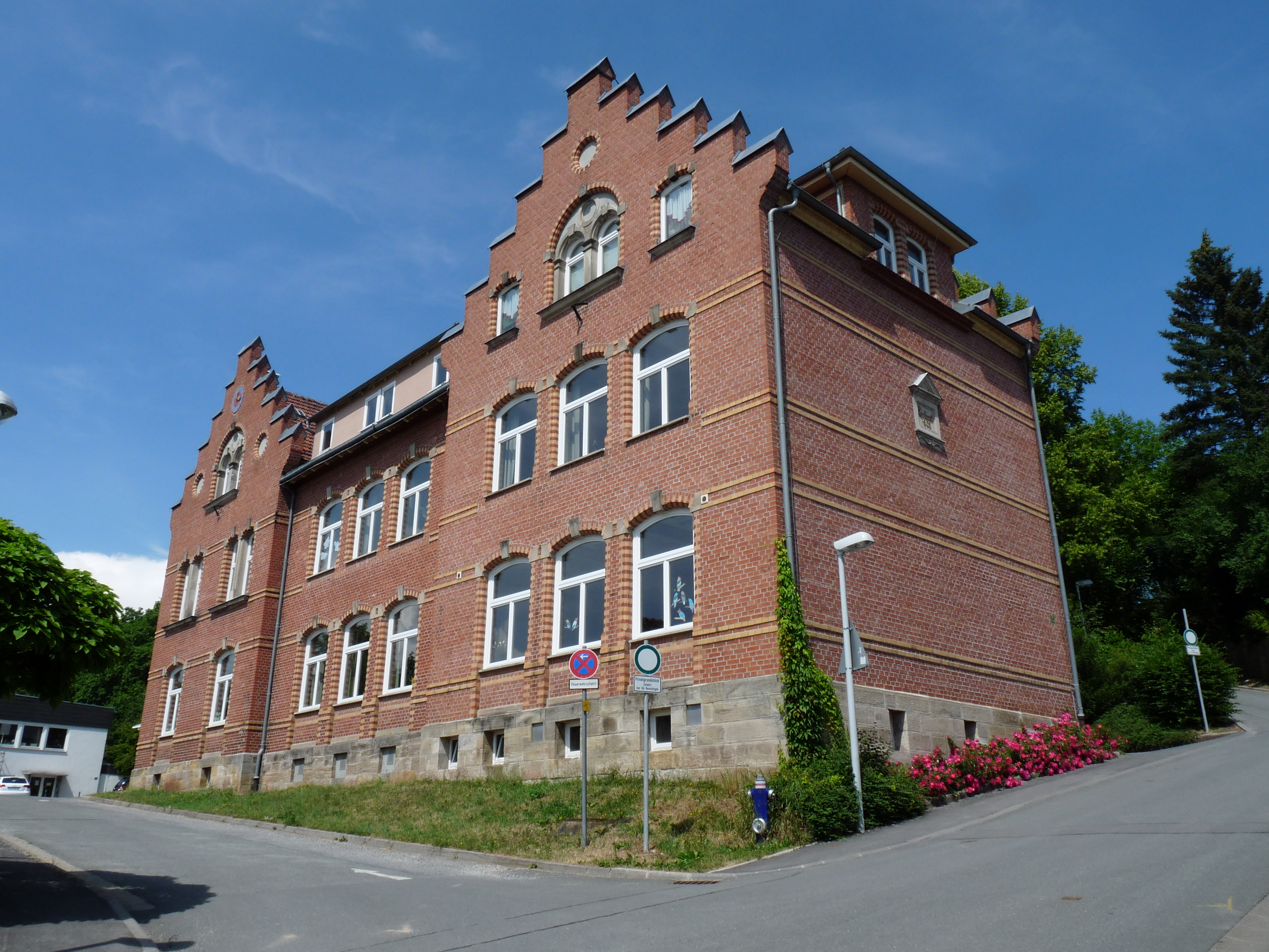 Ansicht der Talfront der Volksschule Coburg-Creidlitz, errichtet 1904